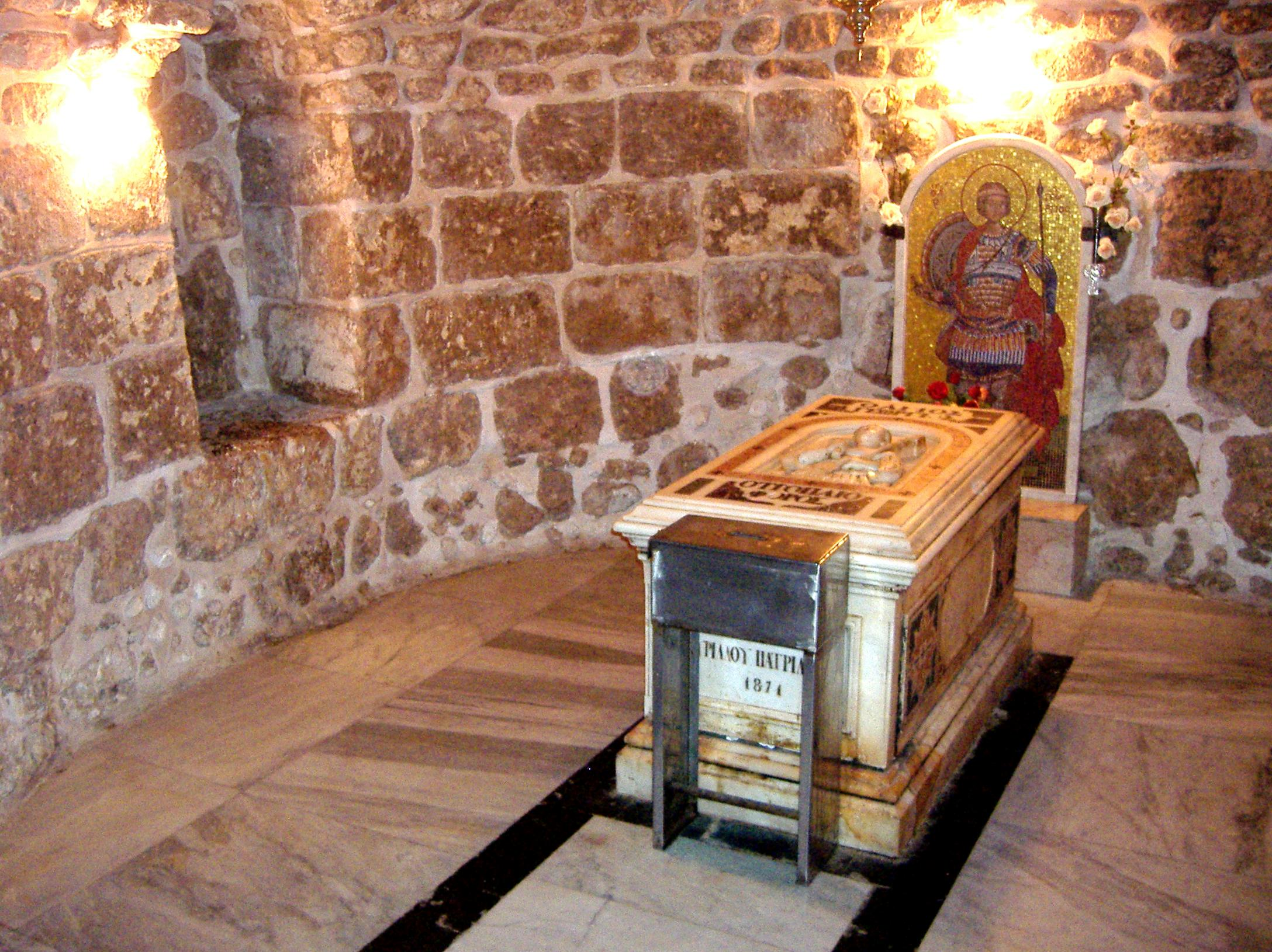 La tomba di San Giorgio (Lod, Israele) 01